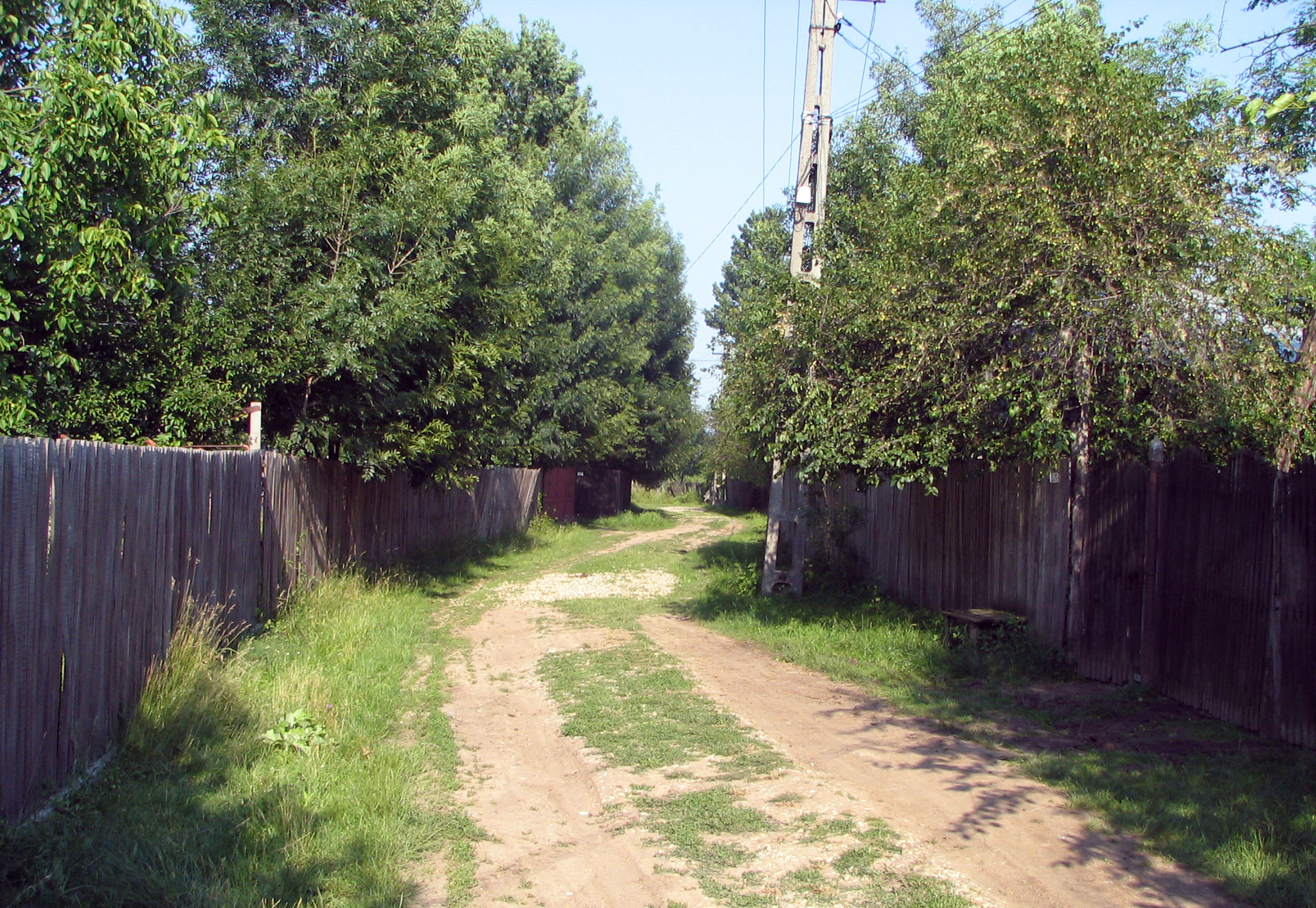 o uliţă în Ungheni, Argeş, România